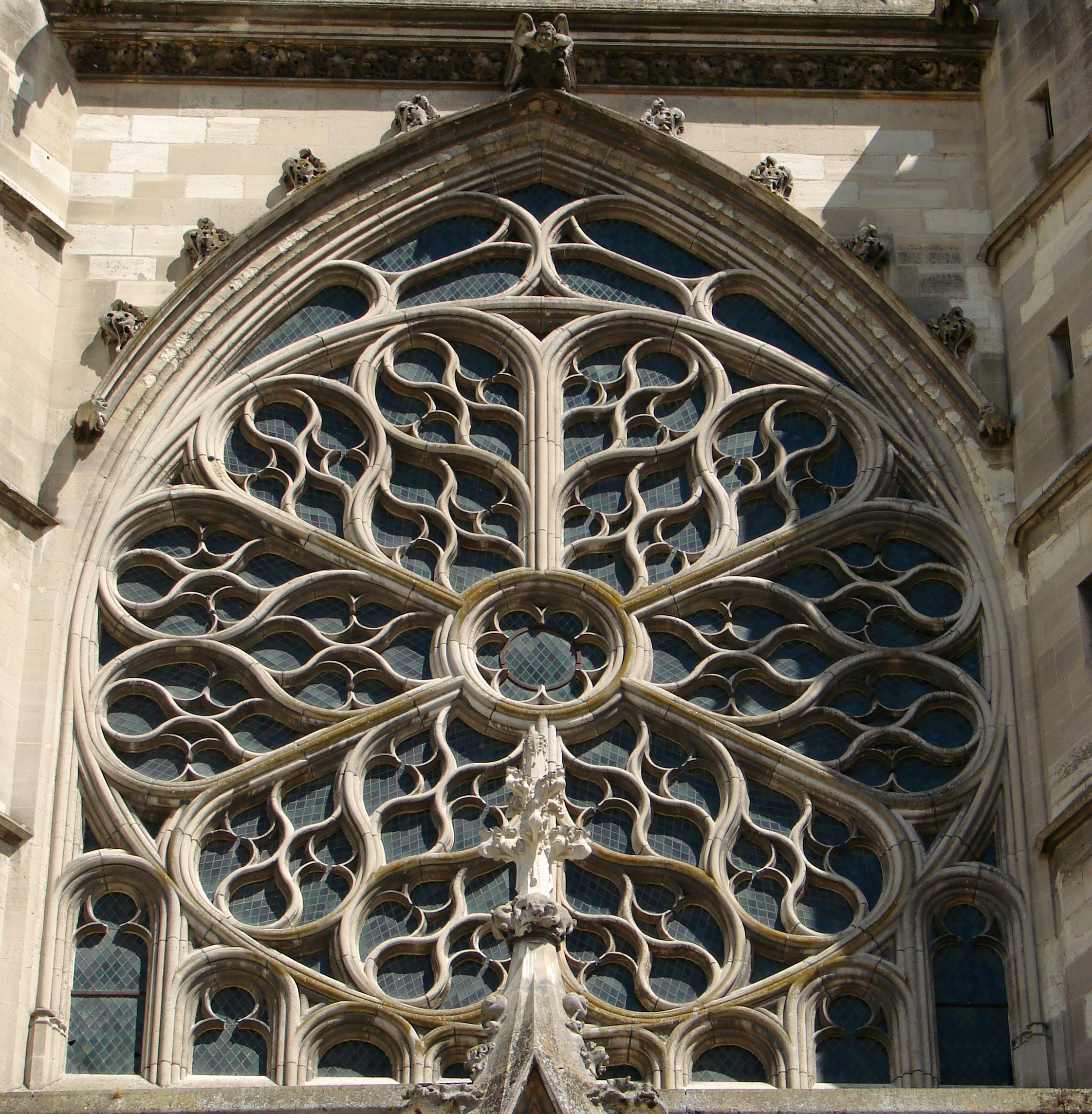 Façade de la cathédrale de Meaux: la rose, de style gothique flamboyant.